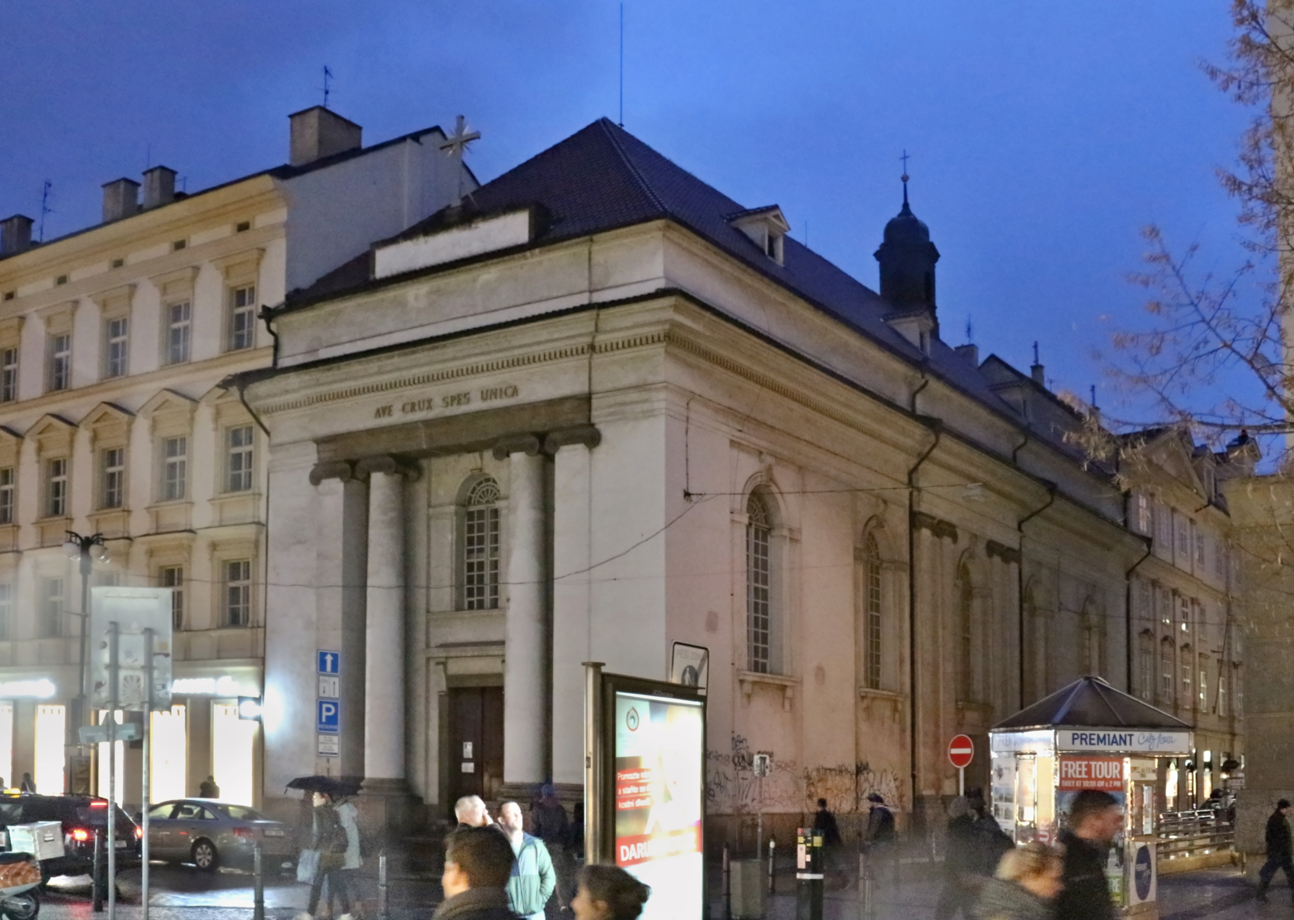 Kostel Svatého Kříže v Praze Na příkopech